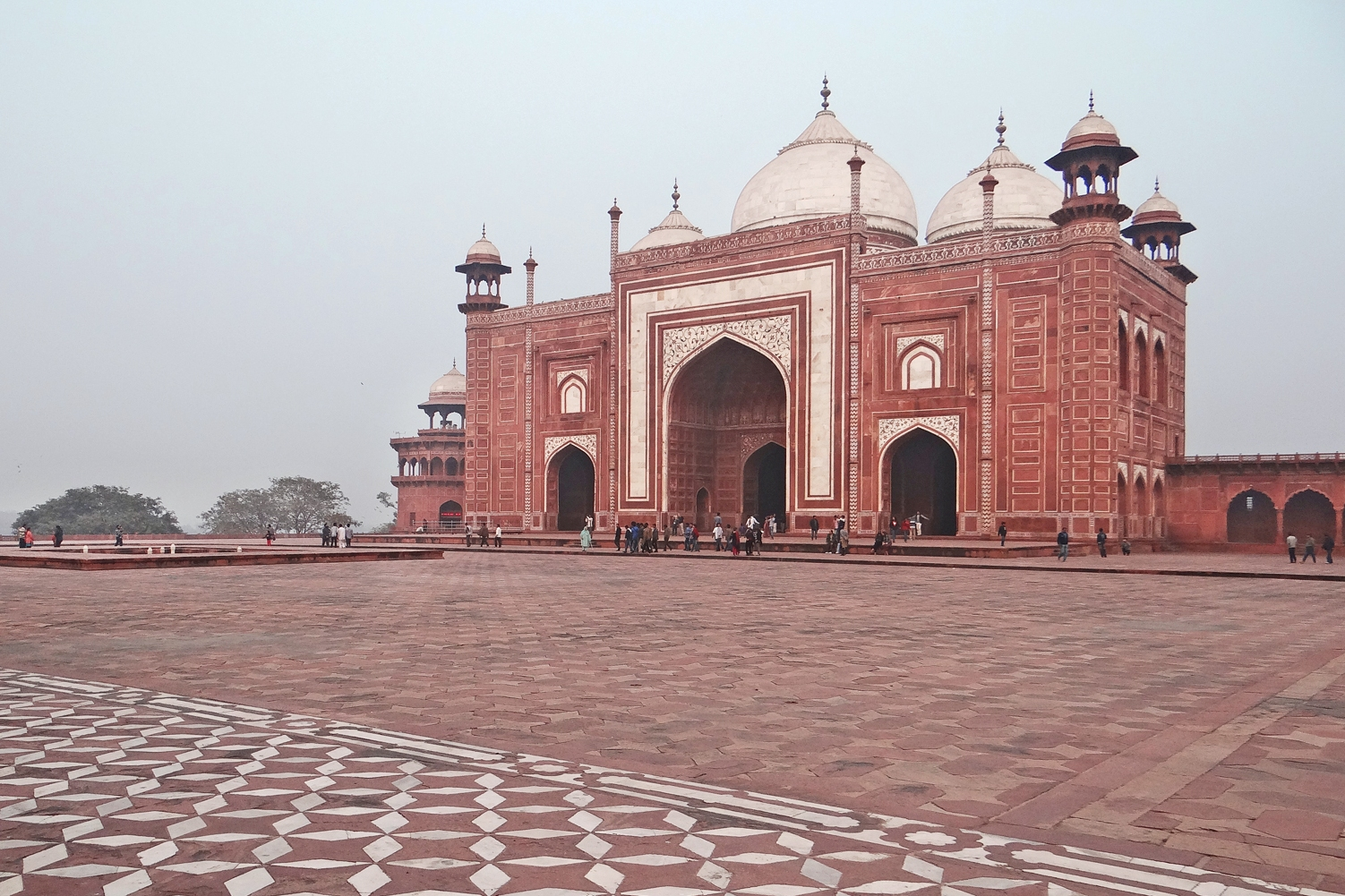 Vue du bâtiment Mehman Khana, symétrique de la mosquée du Taj Mahal au crépuscule A l'ouest et à l'est du mausolée en marbre blanc, se trouvent deux édifices en grès rose, dotés de trois coupoles, qui sont une mosquée et une fausse mosquée, dite réplique ou jawab, appelée hôtellerie dans certains guides. Ces deux bâtiments identiques qui se font face répondent aux règles de construction indo-persane. _____________ Le Taj Mahal est un mausolée en marbre blanc construit entre 1632 et 1648 (ou 1653) à Agra par l'Empereur moghol Shah Jahan pour recevoir le corps de son épouse Mumtaz Mahal, morte en 1631. Le Taj Mahal est classé au patrimoine mondial de l'UNESCO Article de Wikipedia sur le Taj Mahal